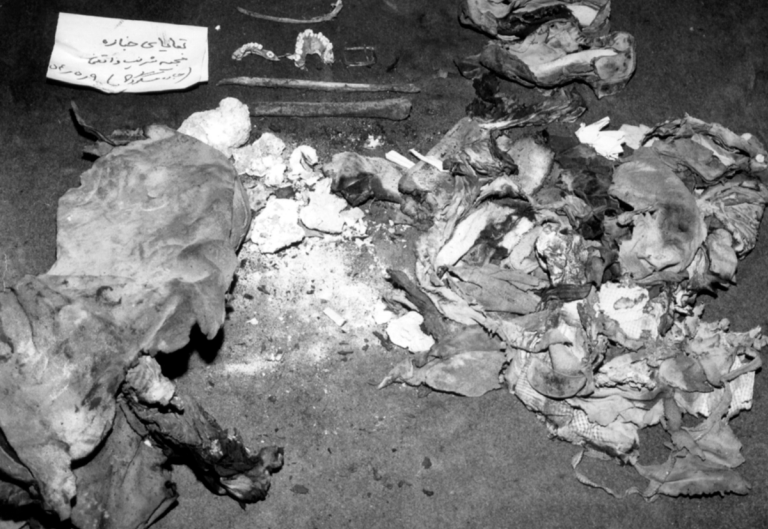 جسد کشف‌شده مجید شریف‌واقفی (عضو کادر مرکزی سازمان مجاهدین خلق ایران) توسط ساواک. روی کاغذ کنار جنازه نوشته شده: «بقایای جنازه مجید شریف واقفی (جاده مسگرآباد) ۵۴/۵/۹»